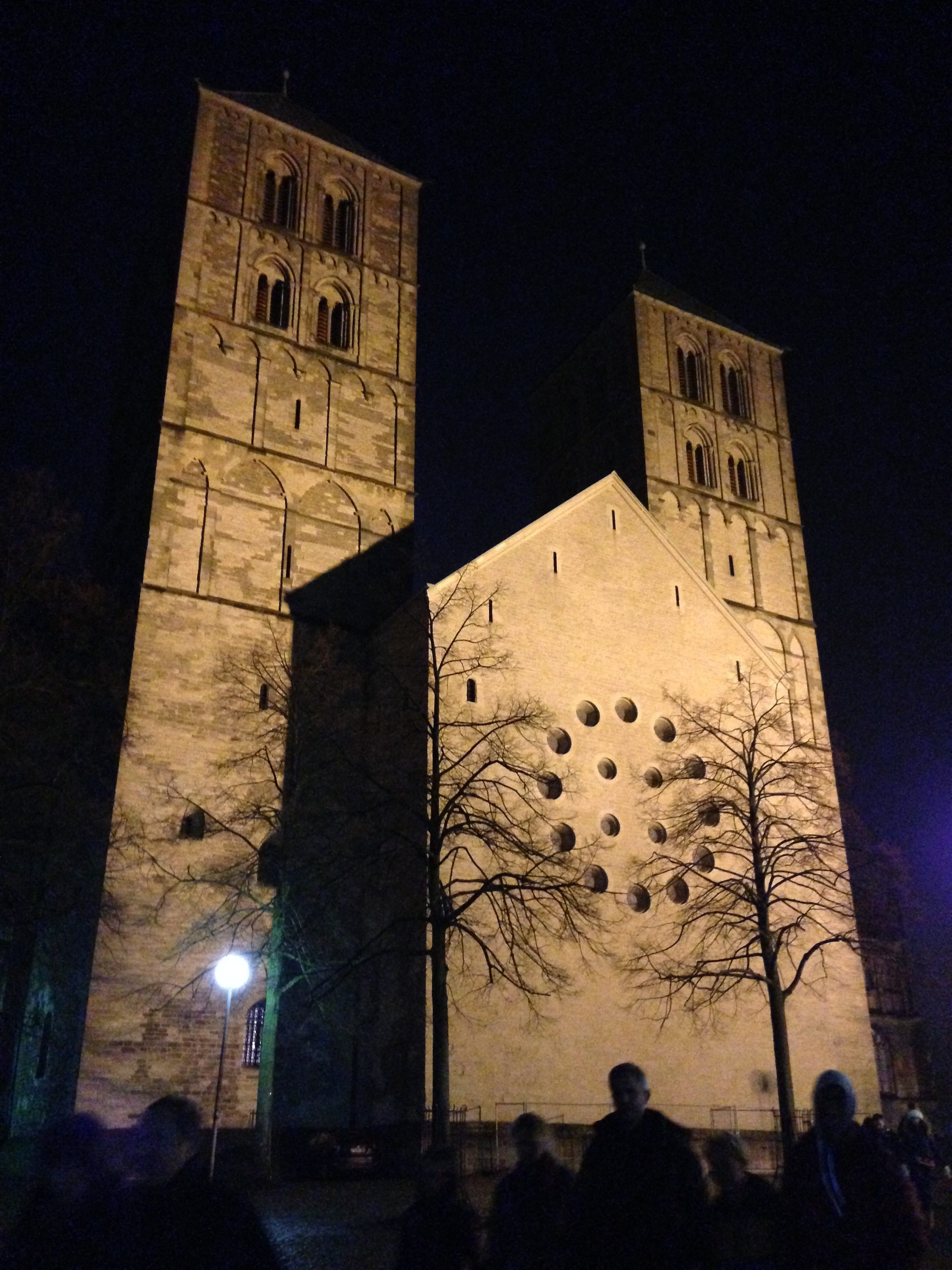 St.-Paulus-Dom (Münster) bei Nacht